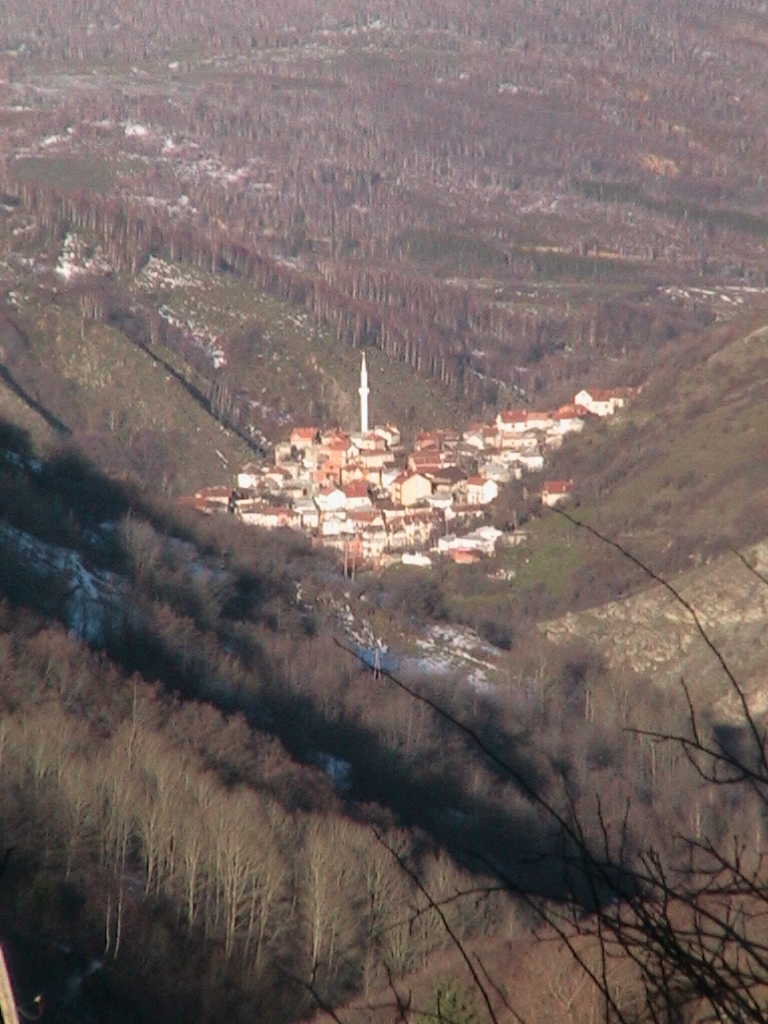 Dikance